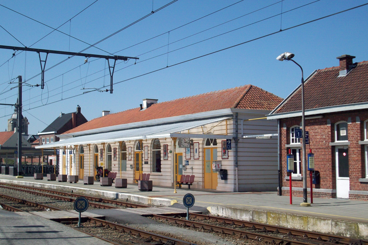 Station Poperinge